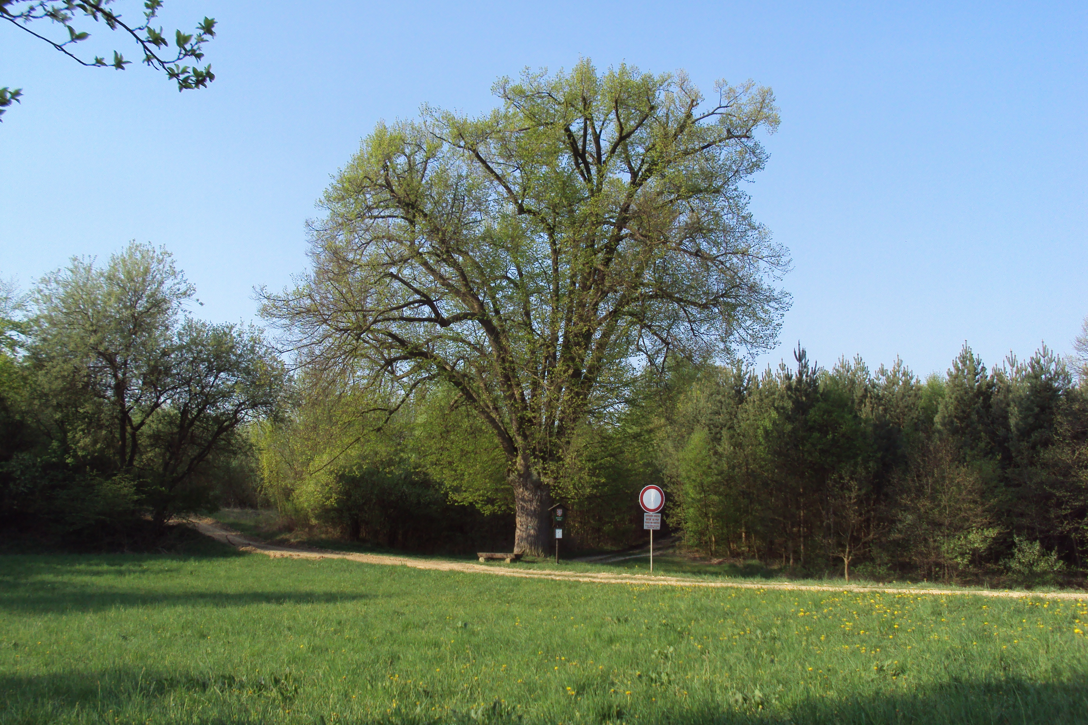 Památná lípa u Nových Osinalic